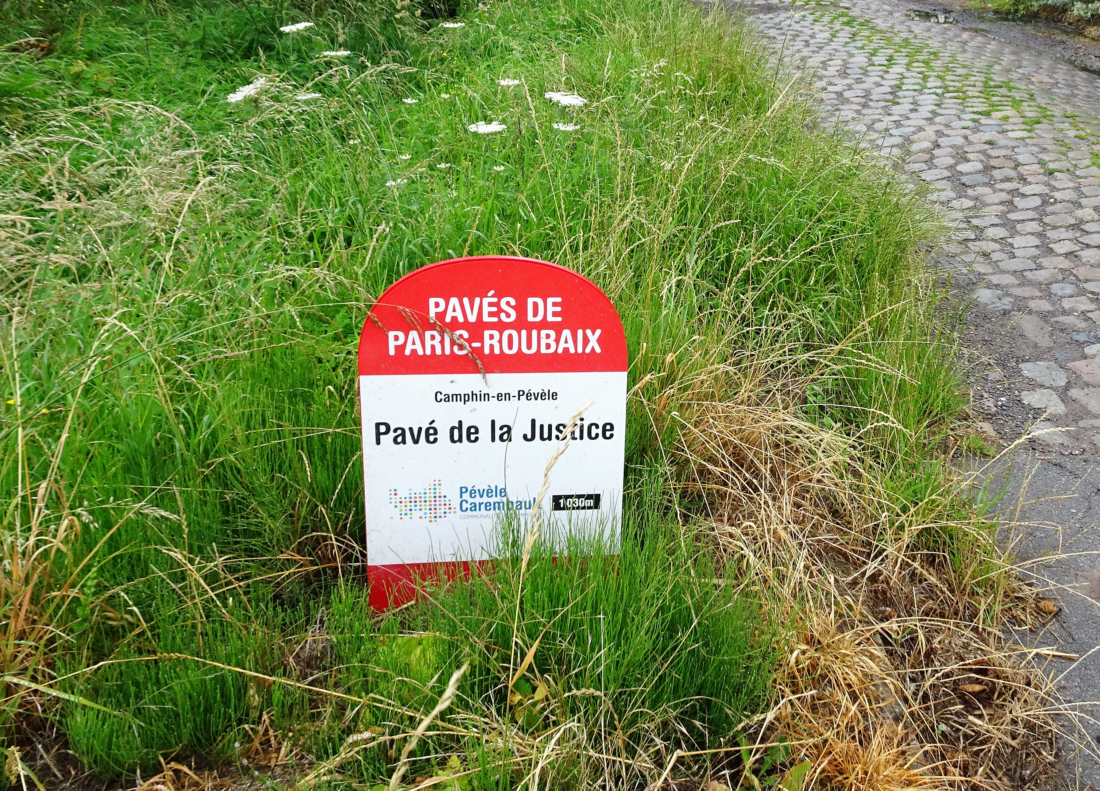 Paris-Roubaix les pavés rue de la Justice.- Camphin-en-Pévèle Nord Hauts-de-France.